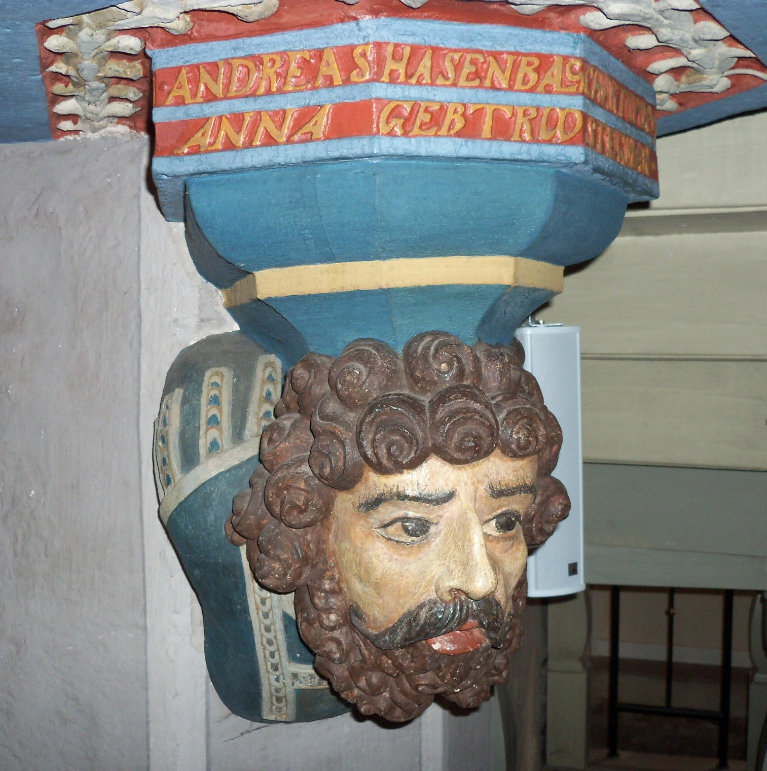 Evangelische Kirche St. Laurentius in Dassel, Niedersachsen, Deutschland – Simsonkopf, der die Kanzel trägt